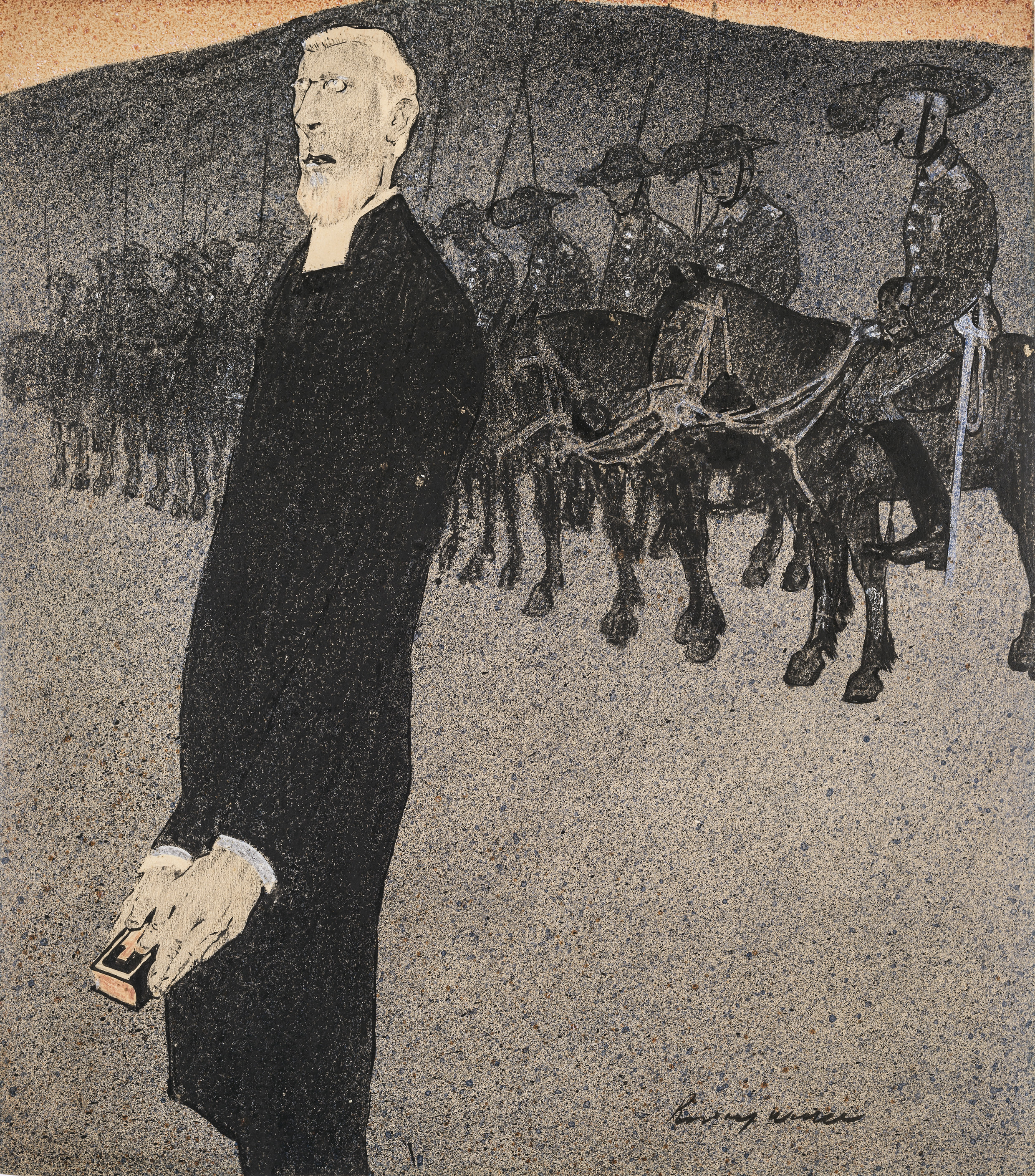 Rudolf Wilke: Gebet vor der Schlacht, 1900, Tusche, Deckweiß und Kohle (Spritztechnik in rot, blau und schwarz) auf Papier, 42 x 37 cm, rechts unten signiert. Veröffentlicht: Simplicissimus. Jahrgang 5 (1900), Heft 27, Seite 217. Text: „Christliche Soldaten, fassen wir unsere Gefühle zusammen in dem Rufe: Der liebe Gott hurra! hurra! hurra!“